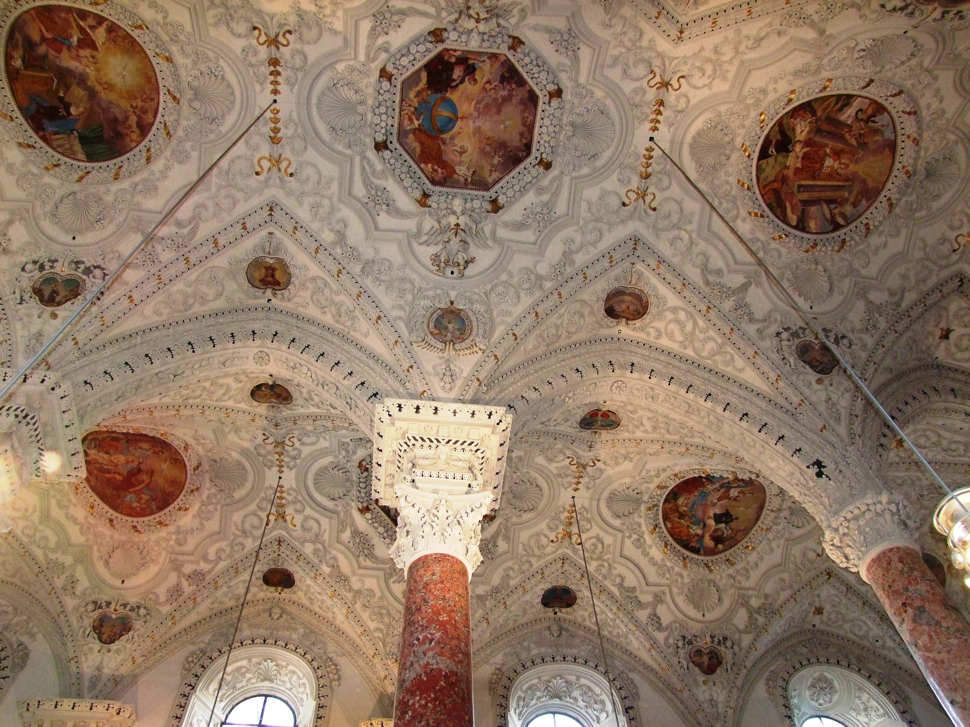 Die Kreuzherrenkirche mit Wessobrunner Stuck und Fresken von Johann Friedrich Sichelbein.